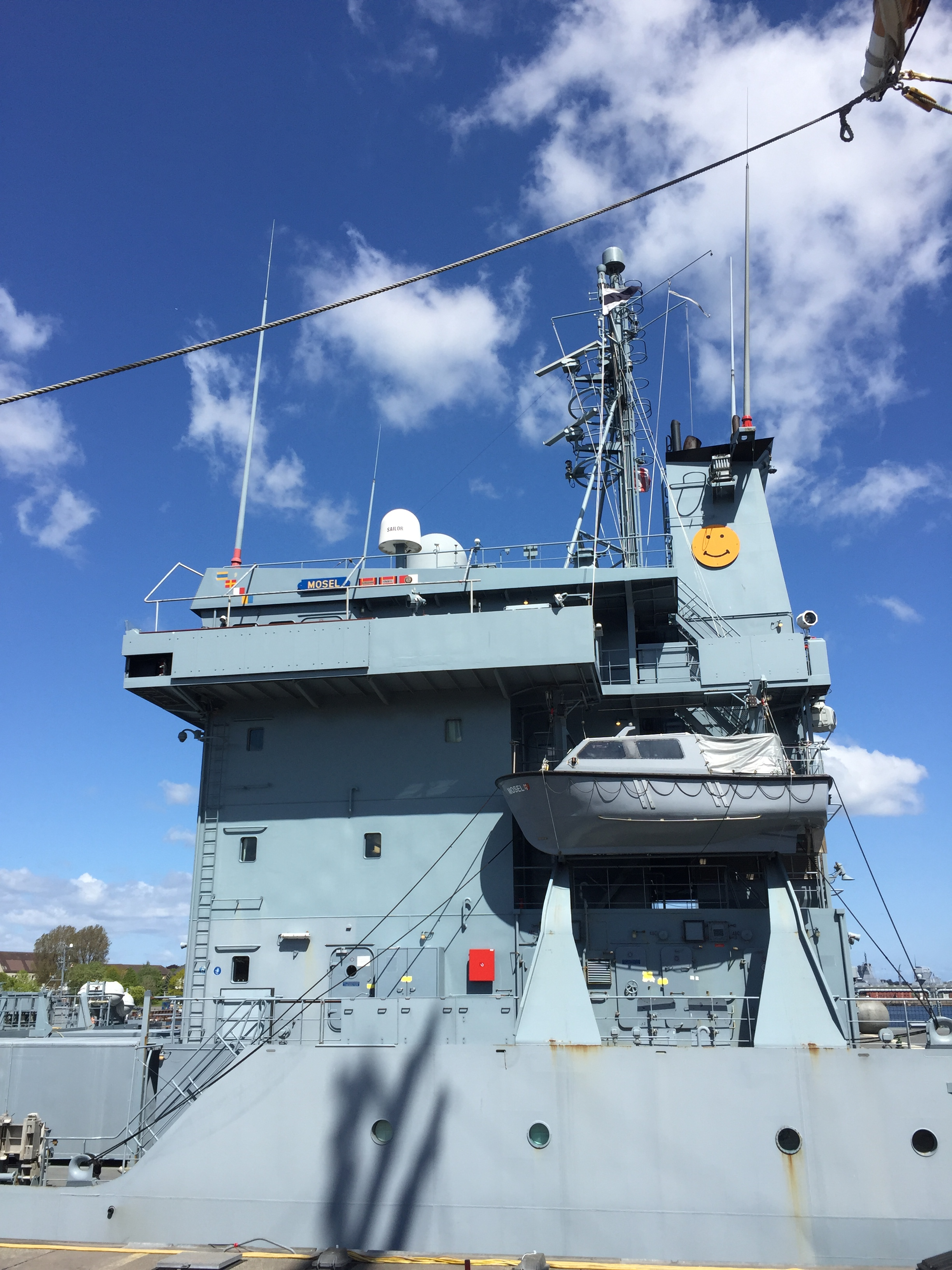 Smiley auf dem dt. Tender Mosel